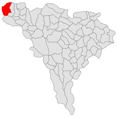 Categorie:Hărţi ale judeţului Alba